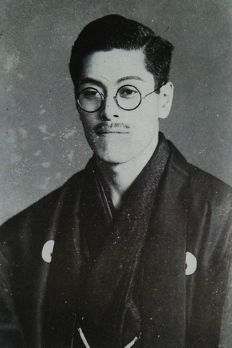 鈴木信雄（弁護士）